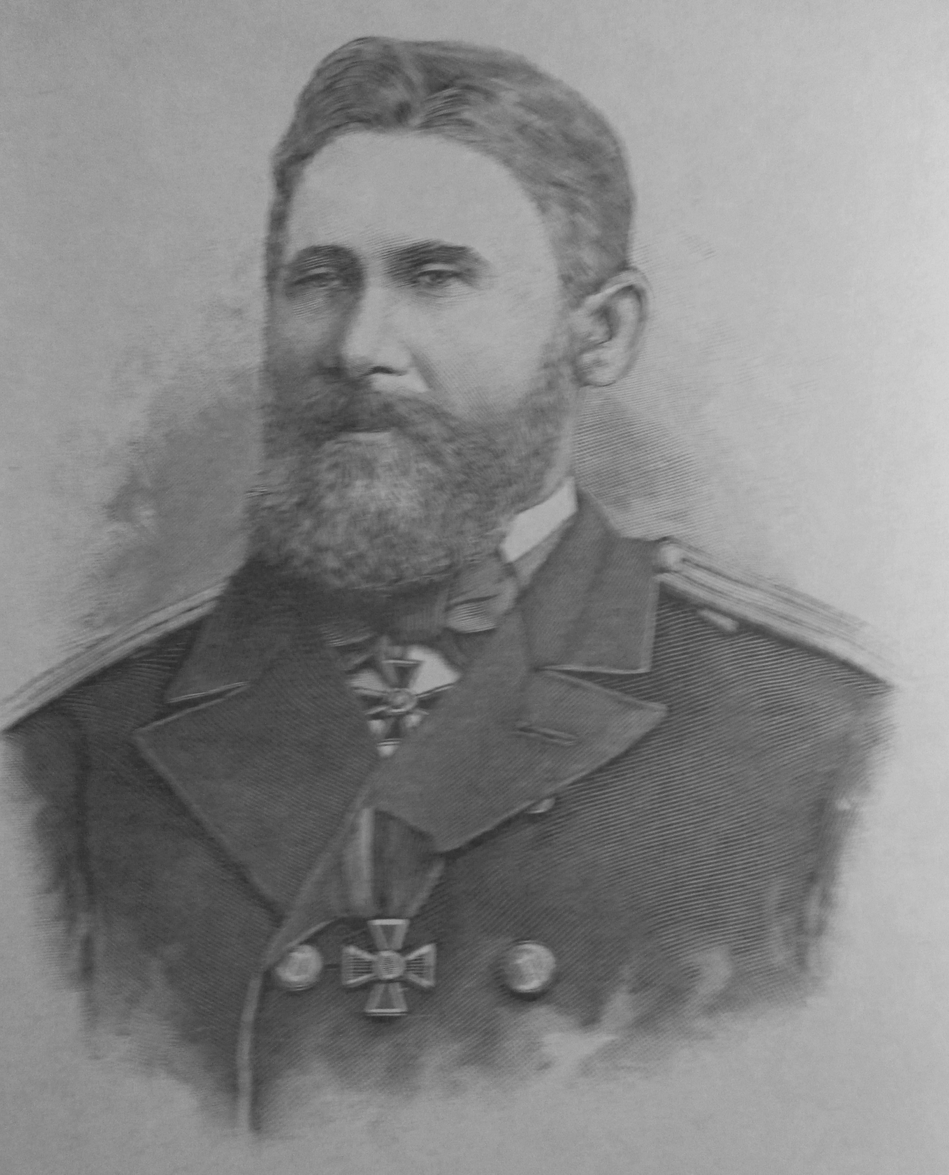 Le capitaine Lavrov, commandant du croiseur Amiral Nakhimov, i L'Illustration, n° 2642, 14 octobre 1893.